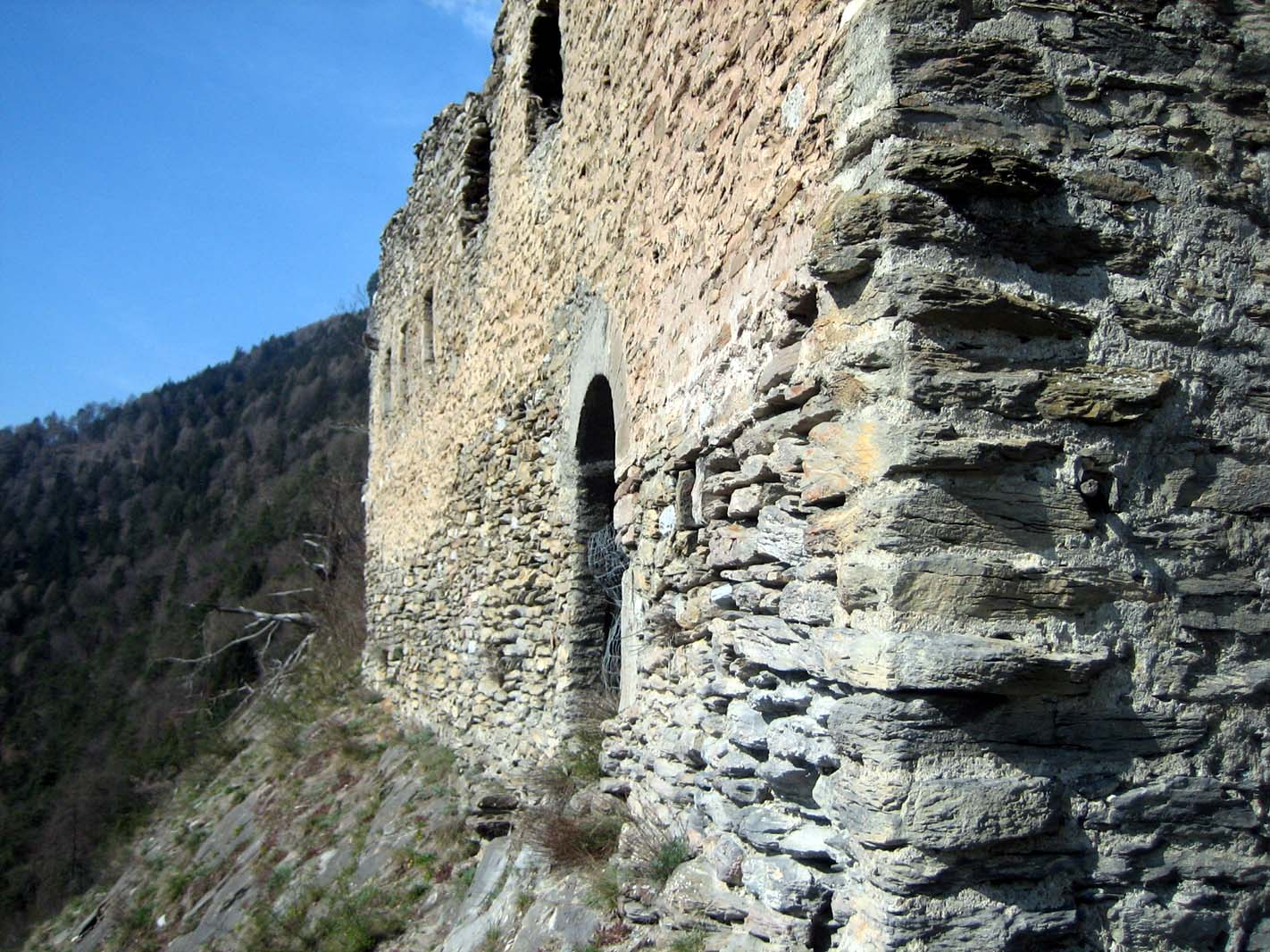 Aussenwand